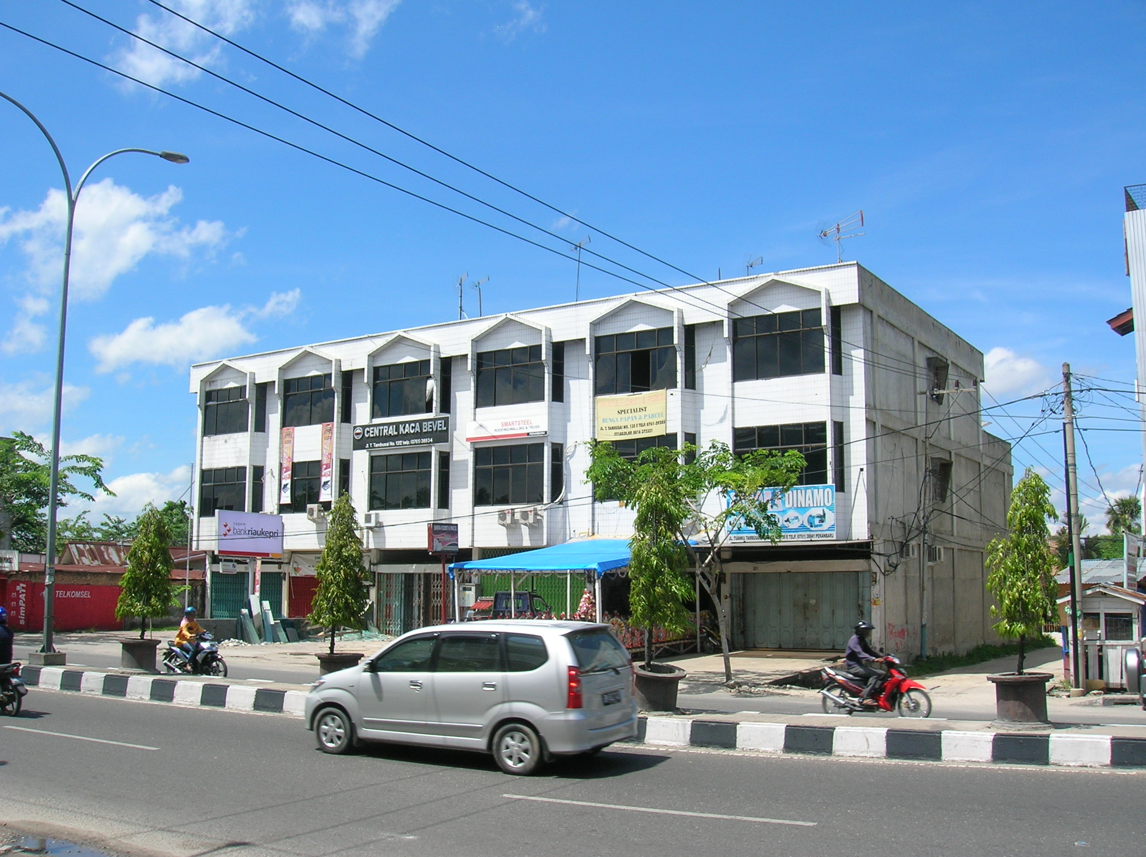 Beberapa rumah toko alias ruko di jalan Tuanku Tambusai, Pekanbaru, Riau, Indonesia.